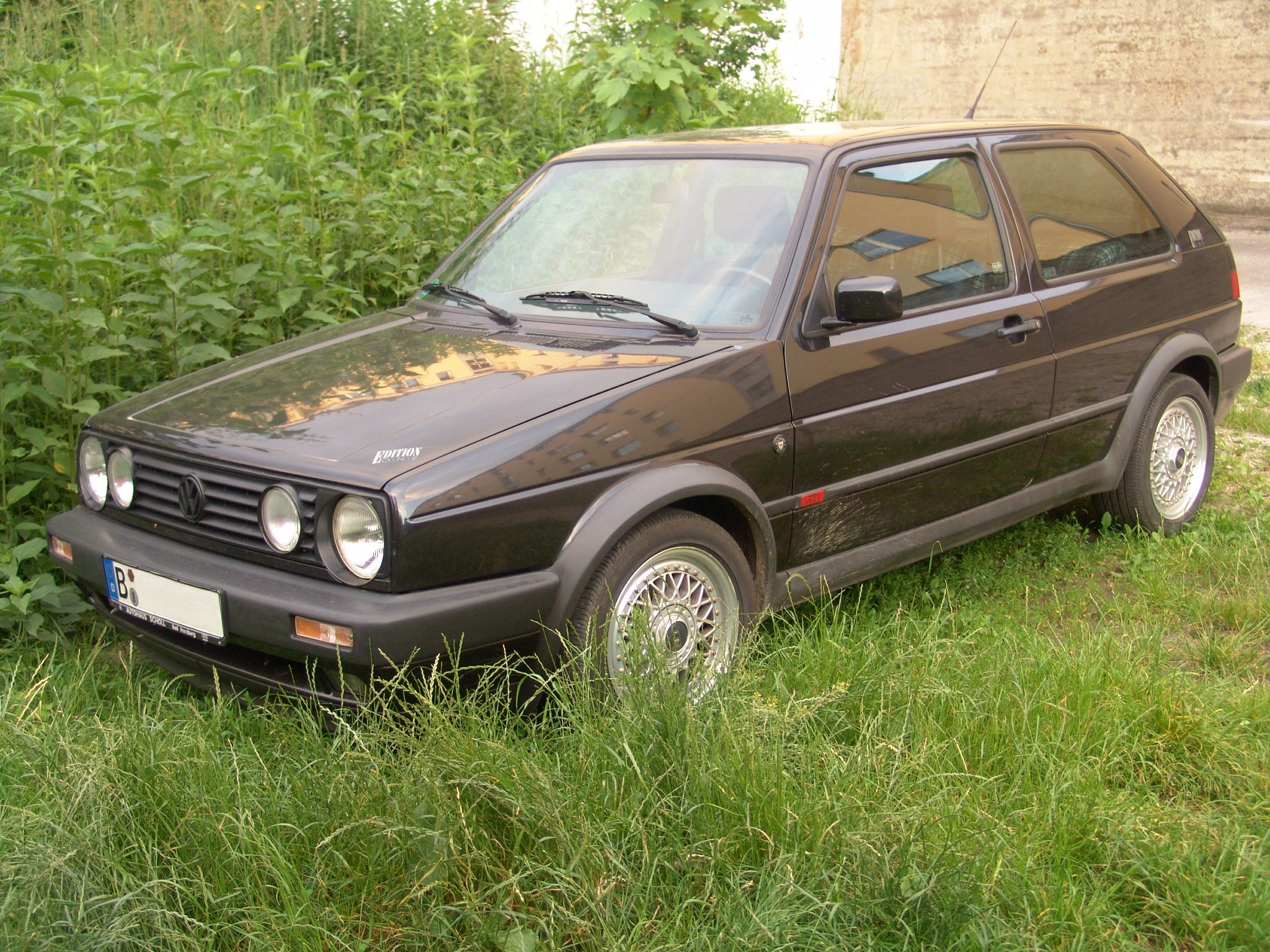 Golf II GTI Edition One